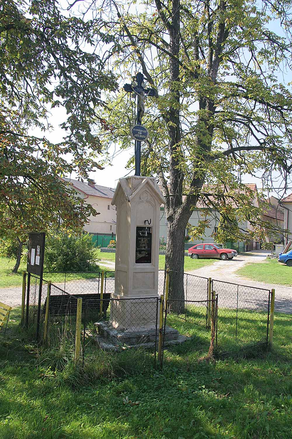 Boží muka v osadě Hlína, district Chrudim, Czech Republic